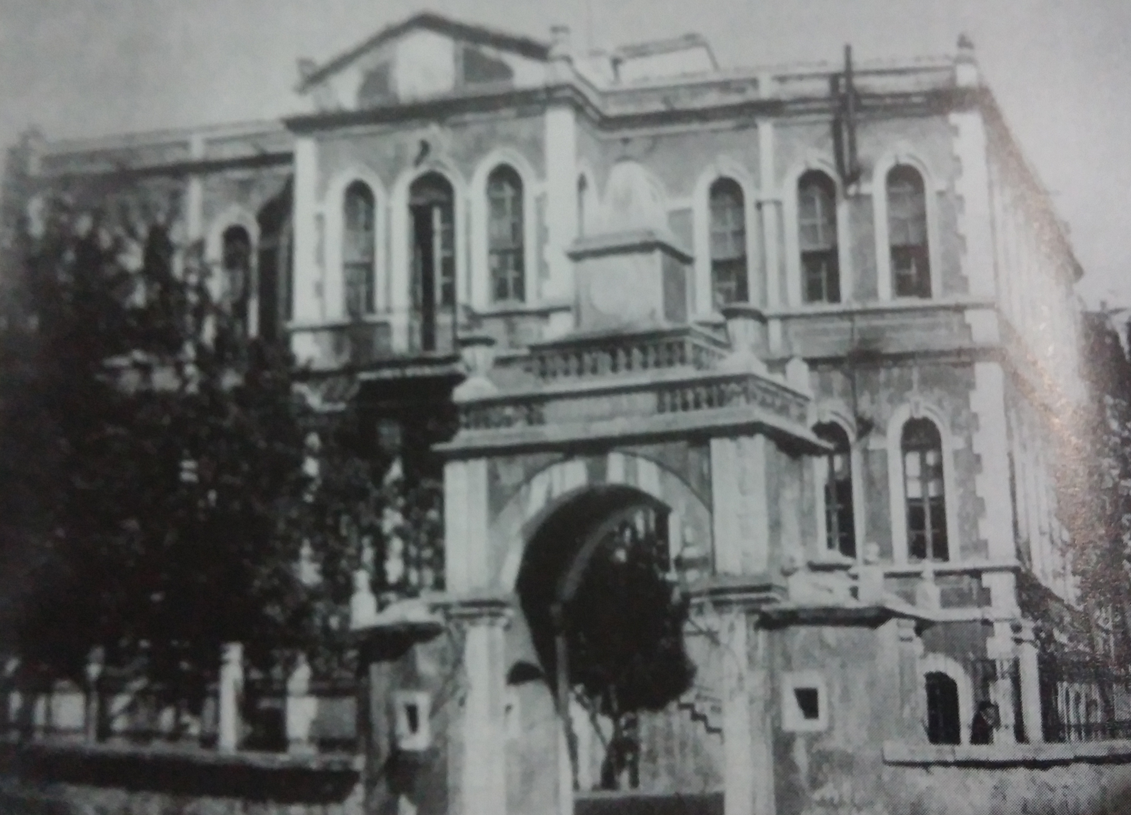 Kastamonu Kumandanlık Binası ve giriş kapısının üzerinde yükselen kulevari saat çıkıntısının bir fotoğrafı.